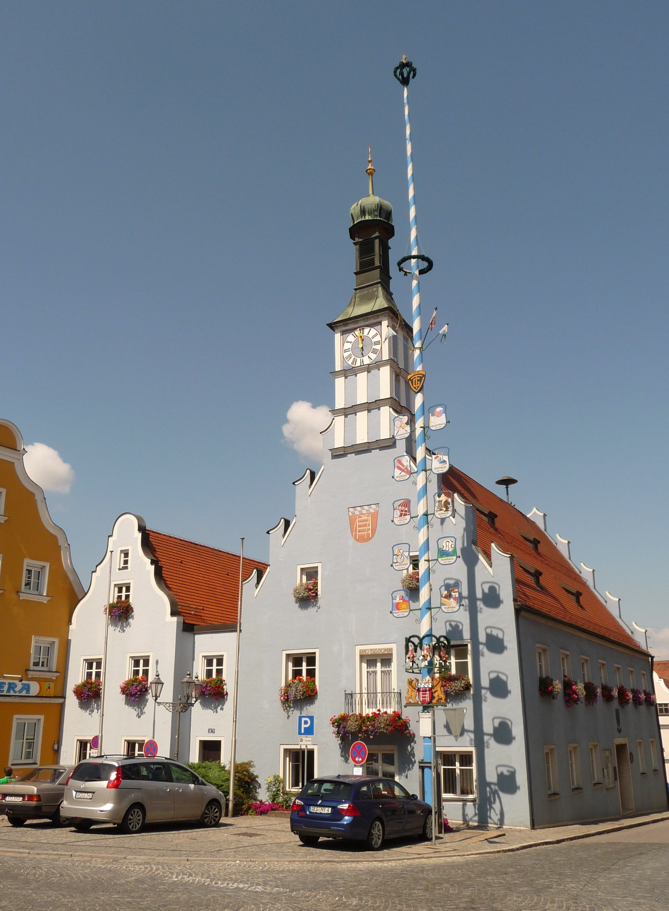 Das historische Rathaus von Geiselhöring, Stadtplatz 4